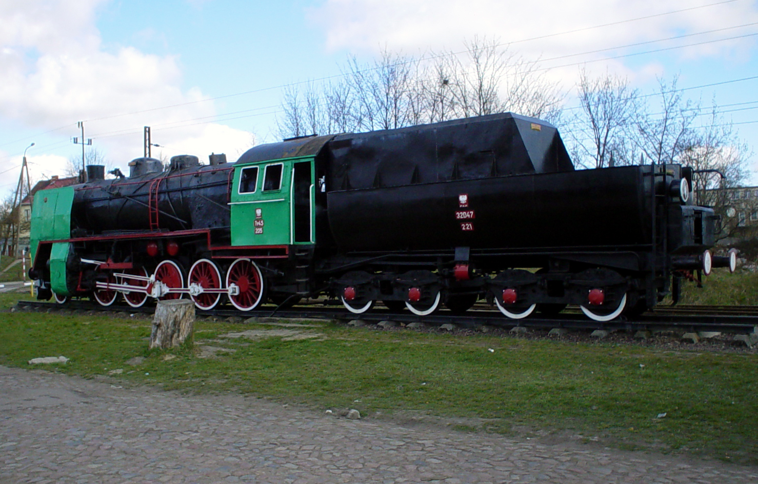 Lokomotywa Ty45 - eksponat. Iłowo-Osada, powiat działdowski, woj. warmińsko-mazurskie